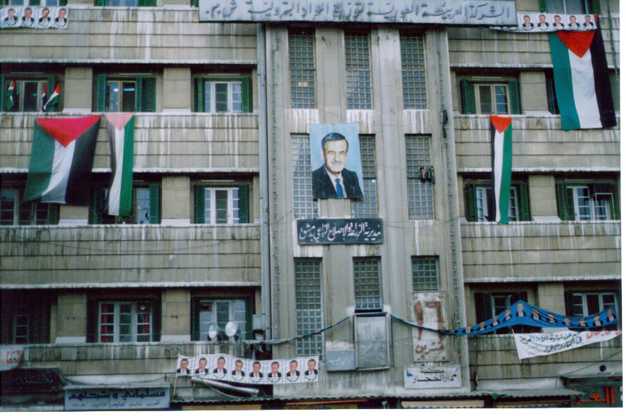 Syria 1992